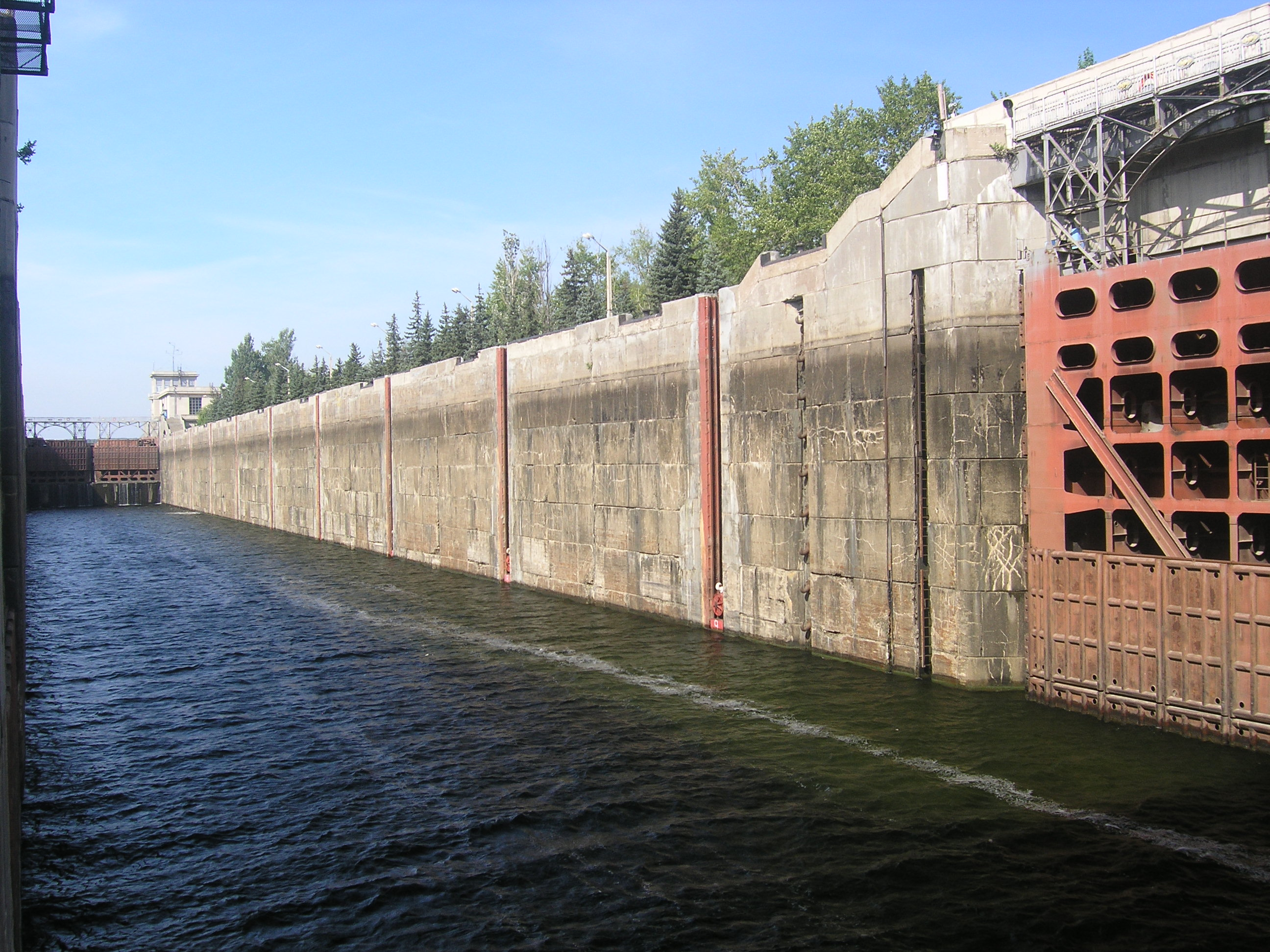 Шлюз № 22, Жигулёвская ГЭС, Россия